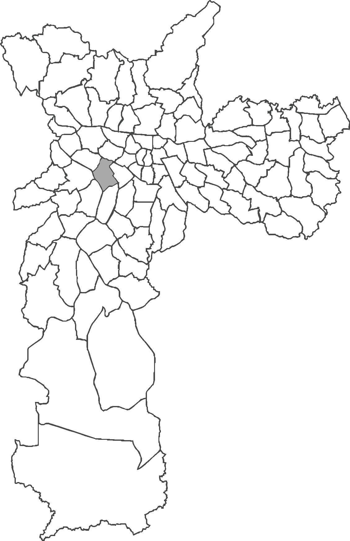 Localização do distrito de Pinheiros no município de São Paulo.